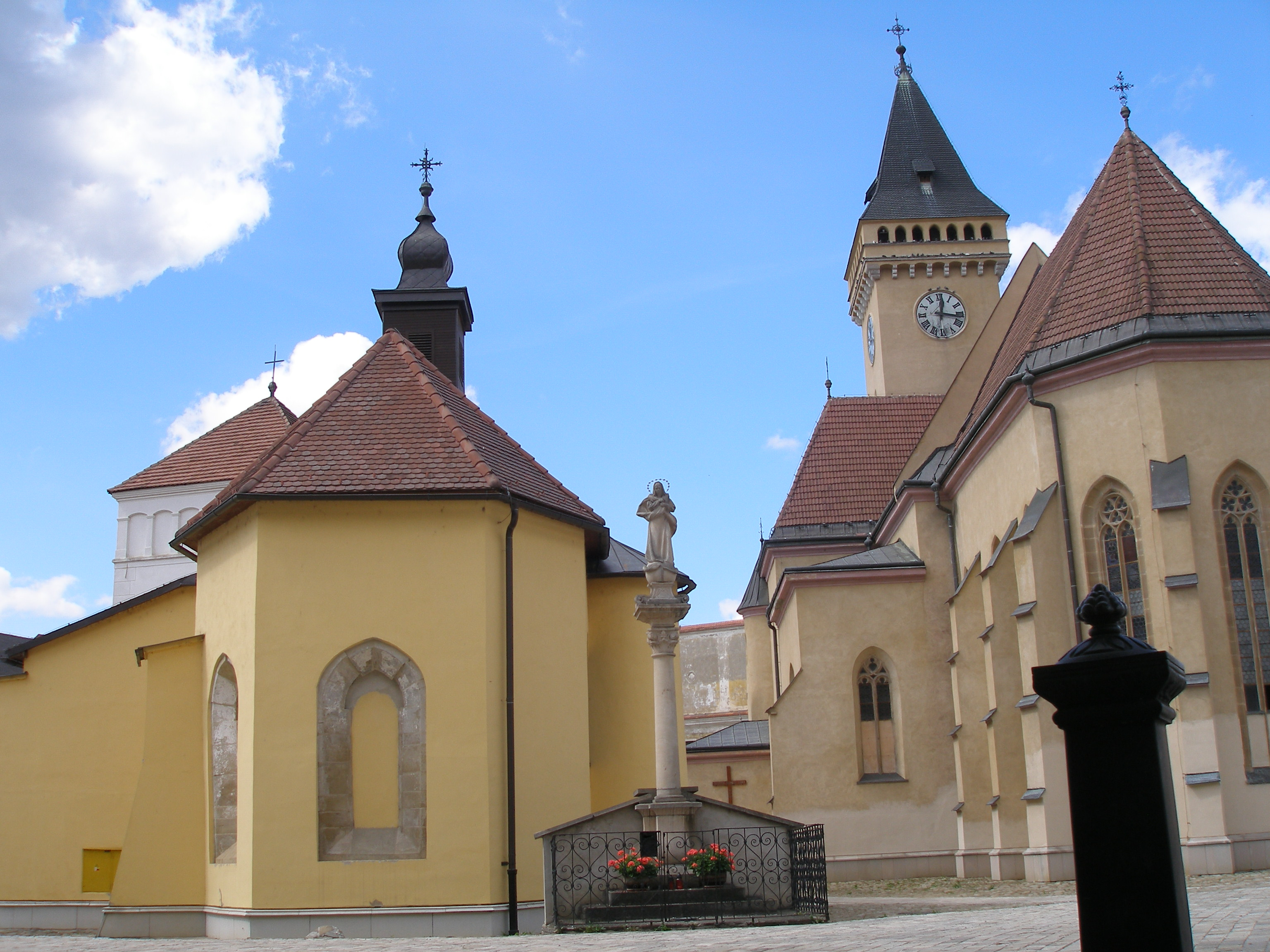 Sabinov starobylé bývalé slobodné kráľovské mesto. Dnes okresné mesto v regióne Šariš. Súkostolie v centre mesta.